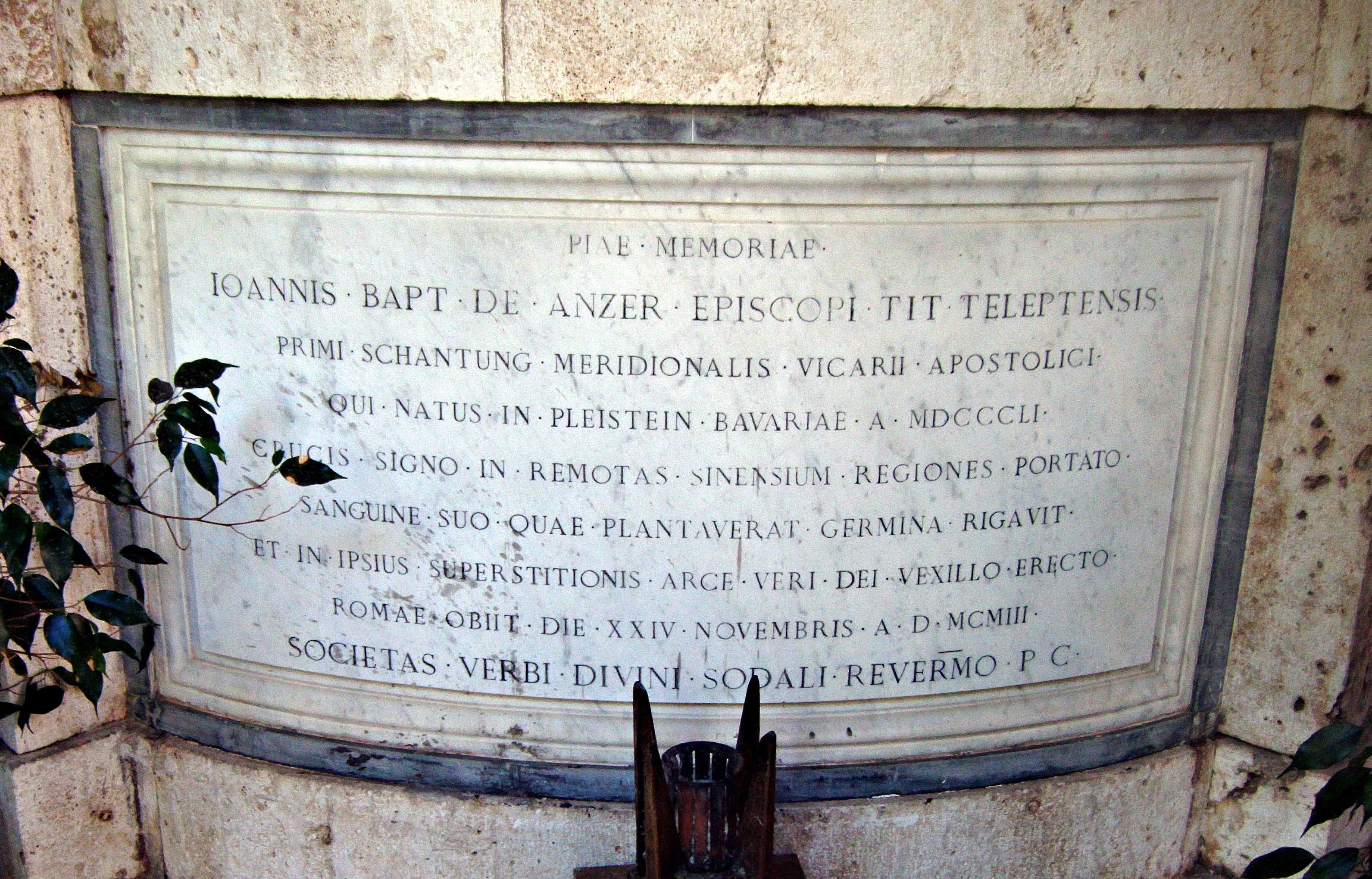 Grab von Bischof Johann Baptist von Anzer (1851-1903), Campo Santo Teutonico, Rom